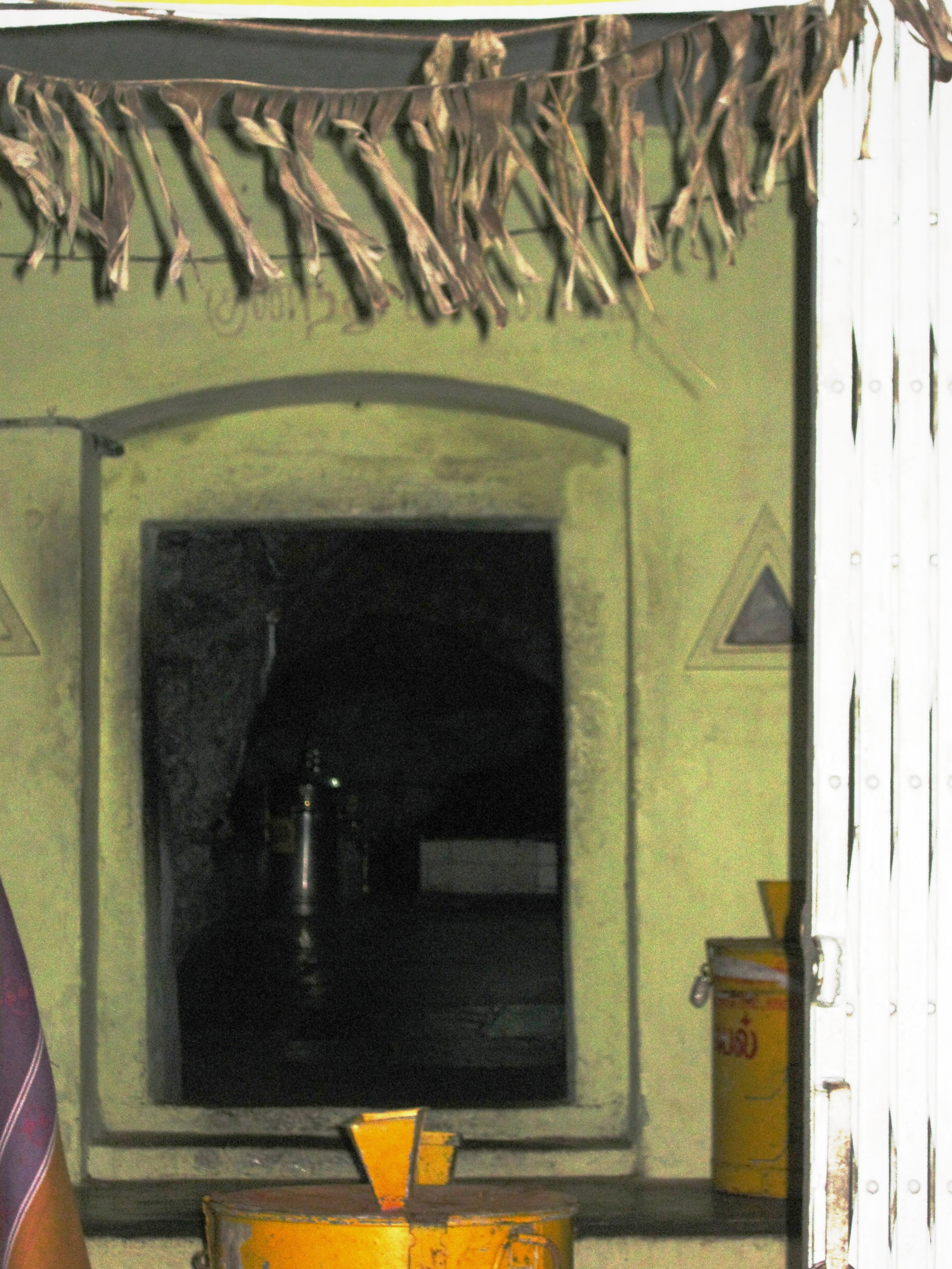 SHEVAROY TEMPLE, Yercaud, Salem